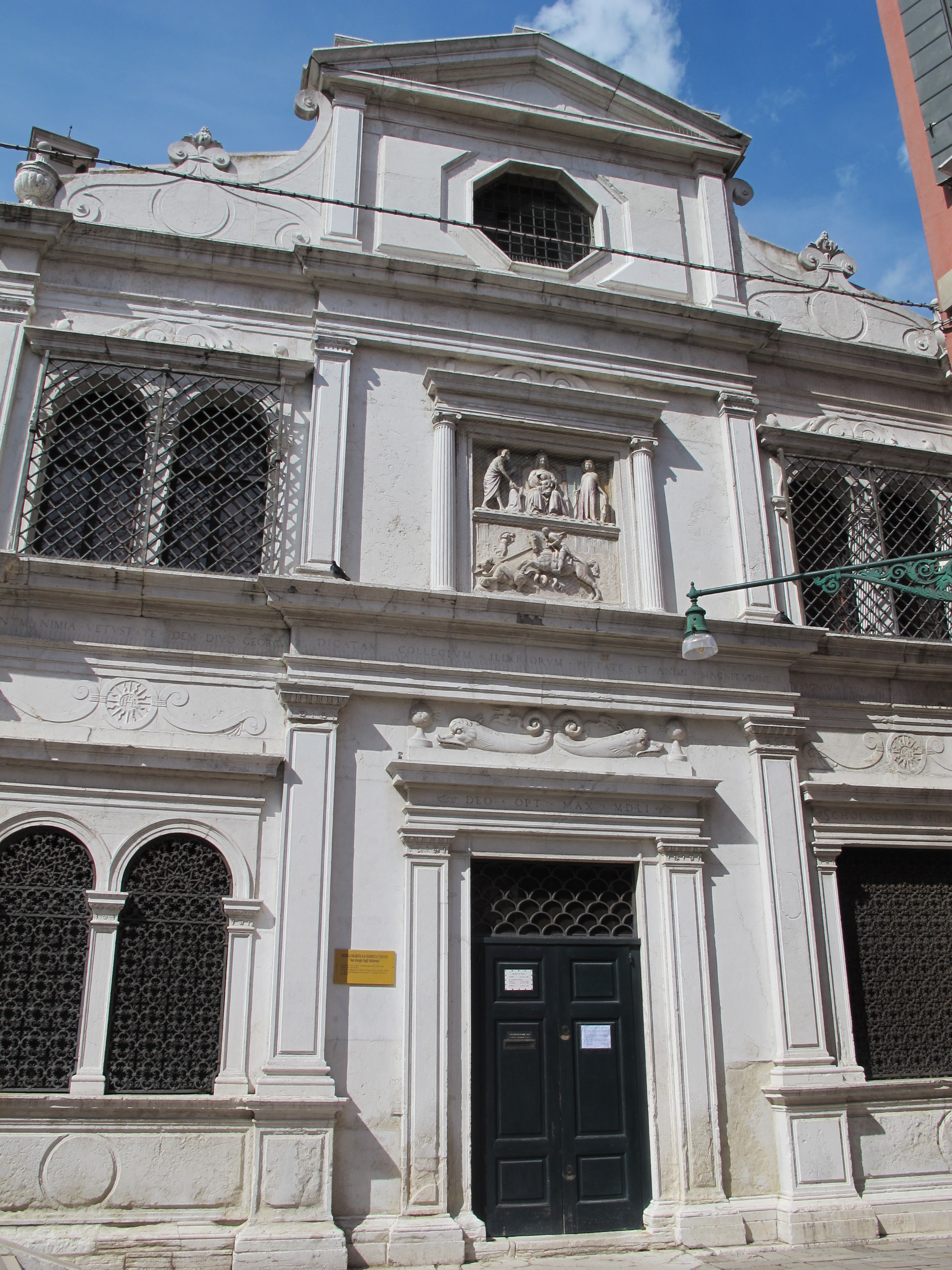 Scuola di san giorgio degli schiavoni